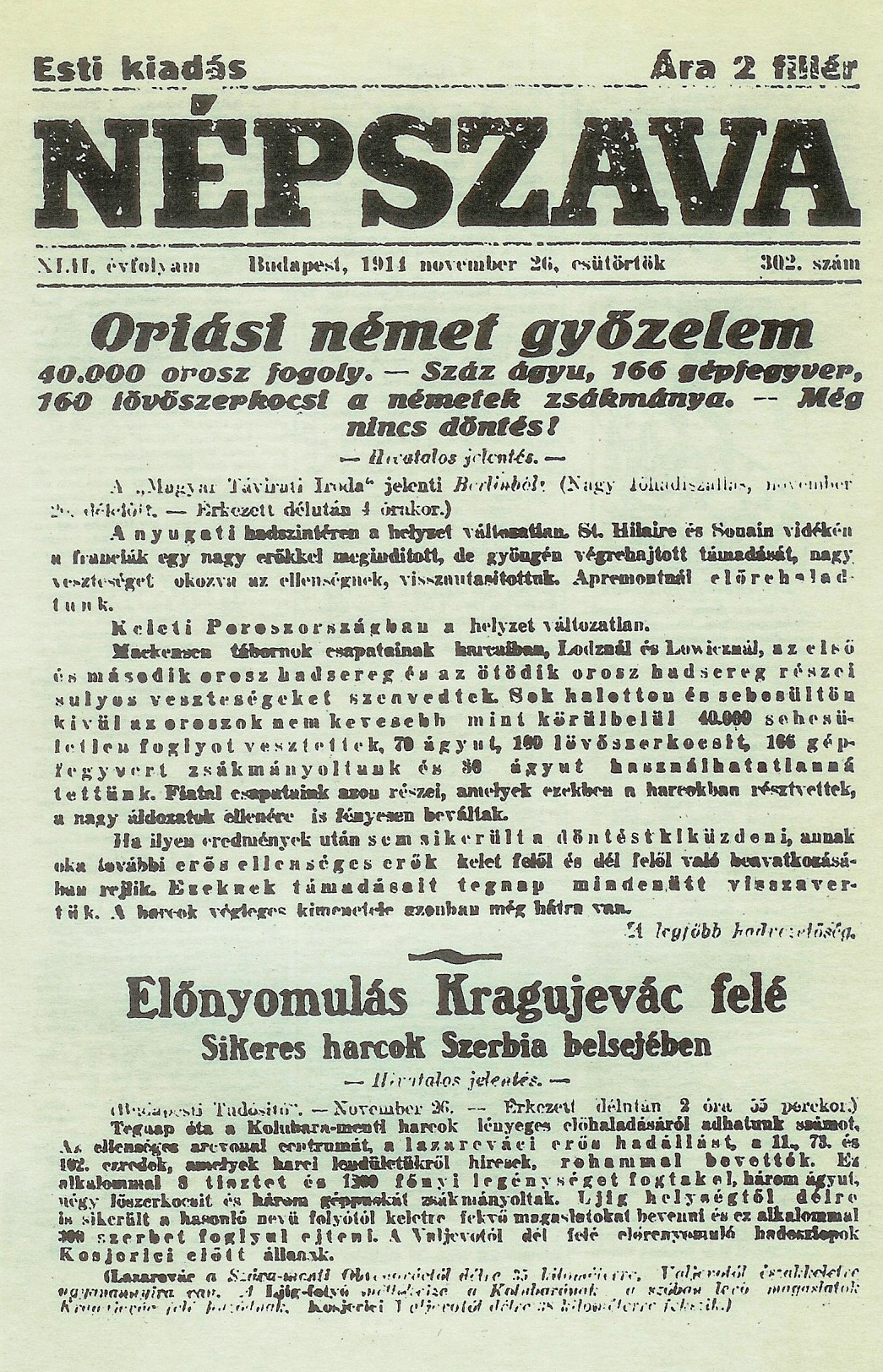 Népszava esti kiadása (1914. november 26, csütörtök)